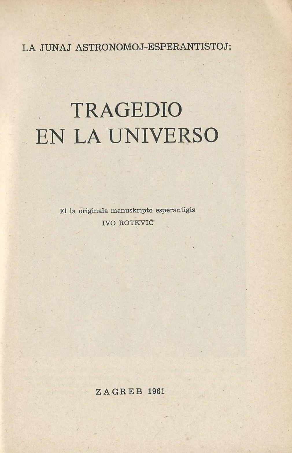 librokovrilo de "Tragedio en la Universo", 1961